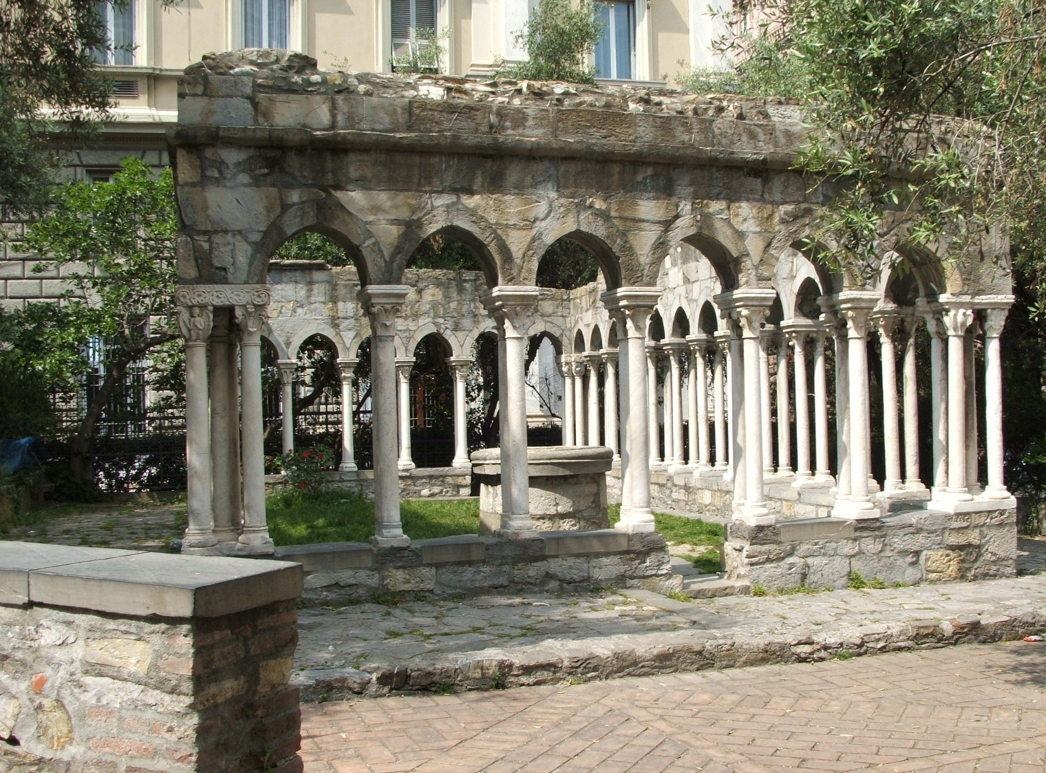 Genova